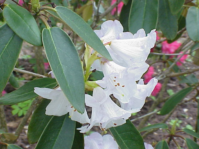 Species: 'Rhododendron campanulatum subsp. campanulatum' Family: Ericaceae Image No. 2